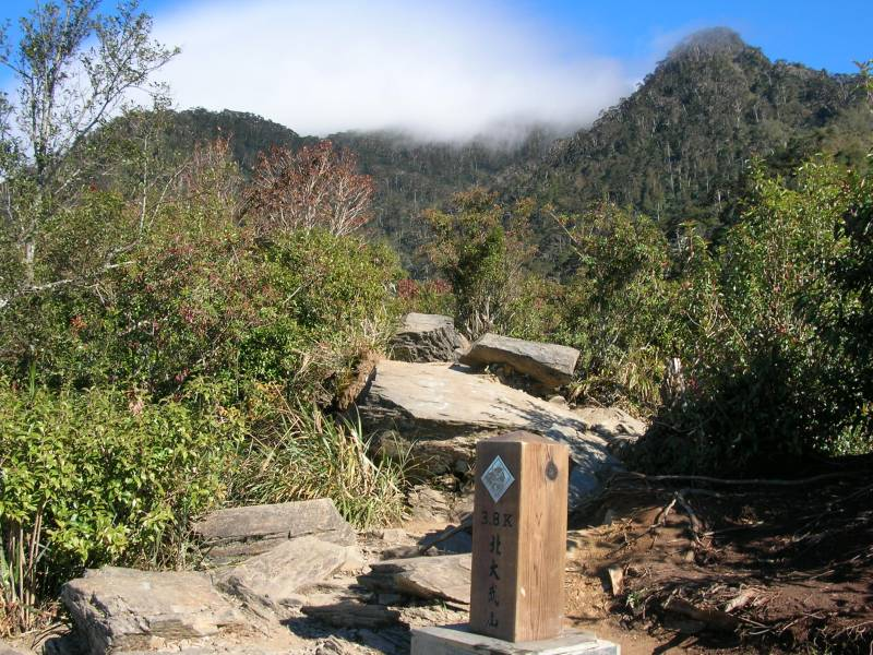 3.8K光明頂